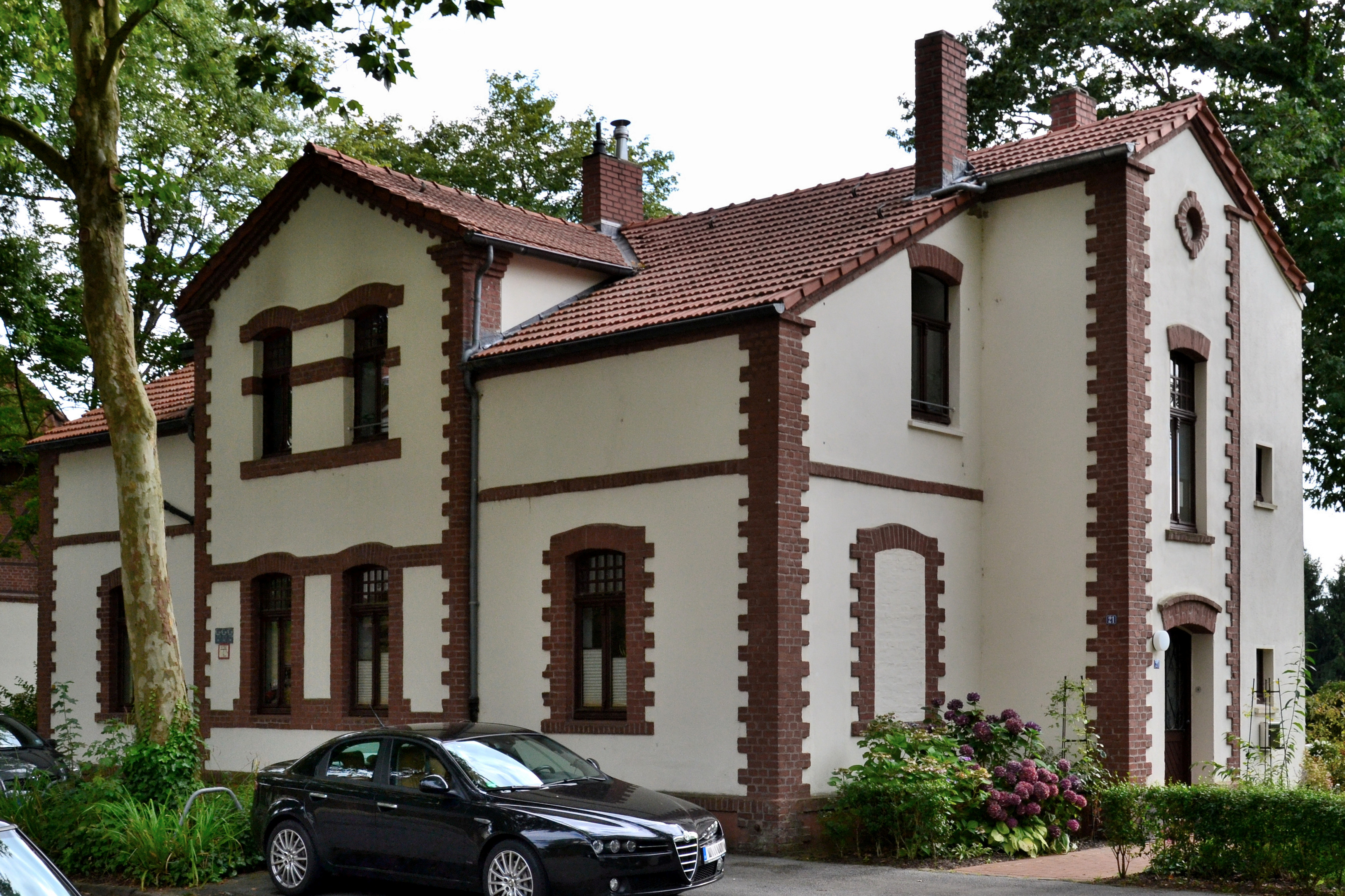 Wohnhaus der Siedlung Carl Funke in Essen-Heisingen, unter Denkmalschutz